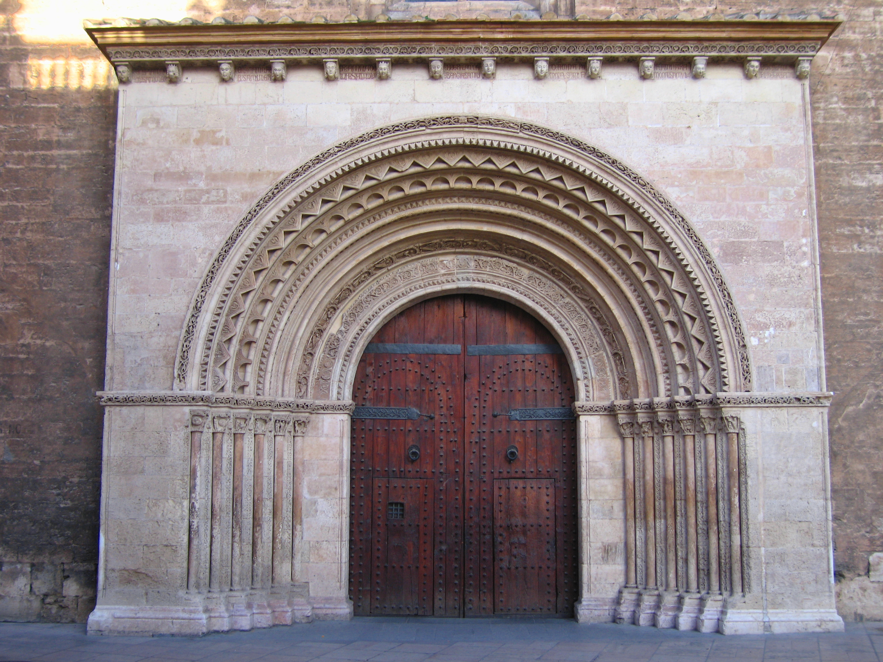 Porta romànica de l'Almoina (València)